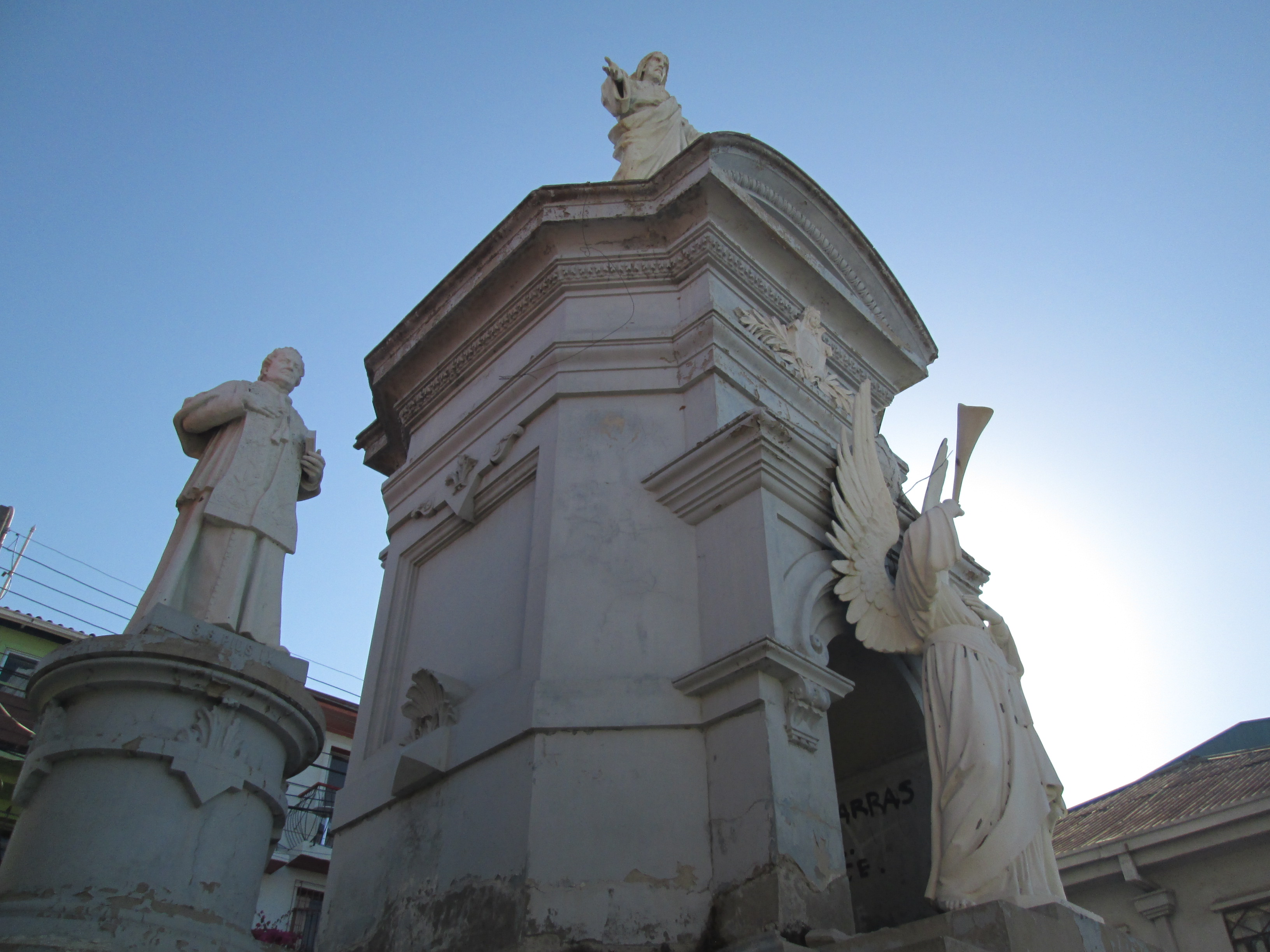 Monumento al Cristo Redentor en Valparaíso